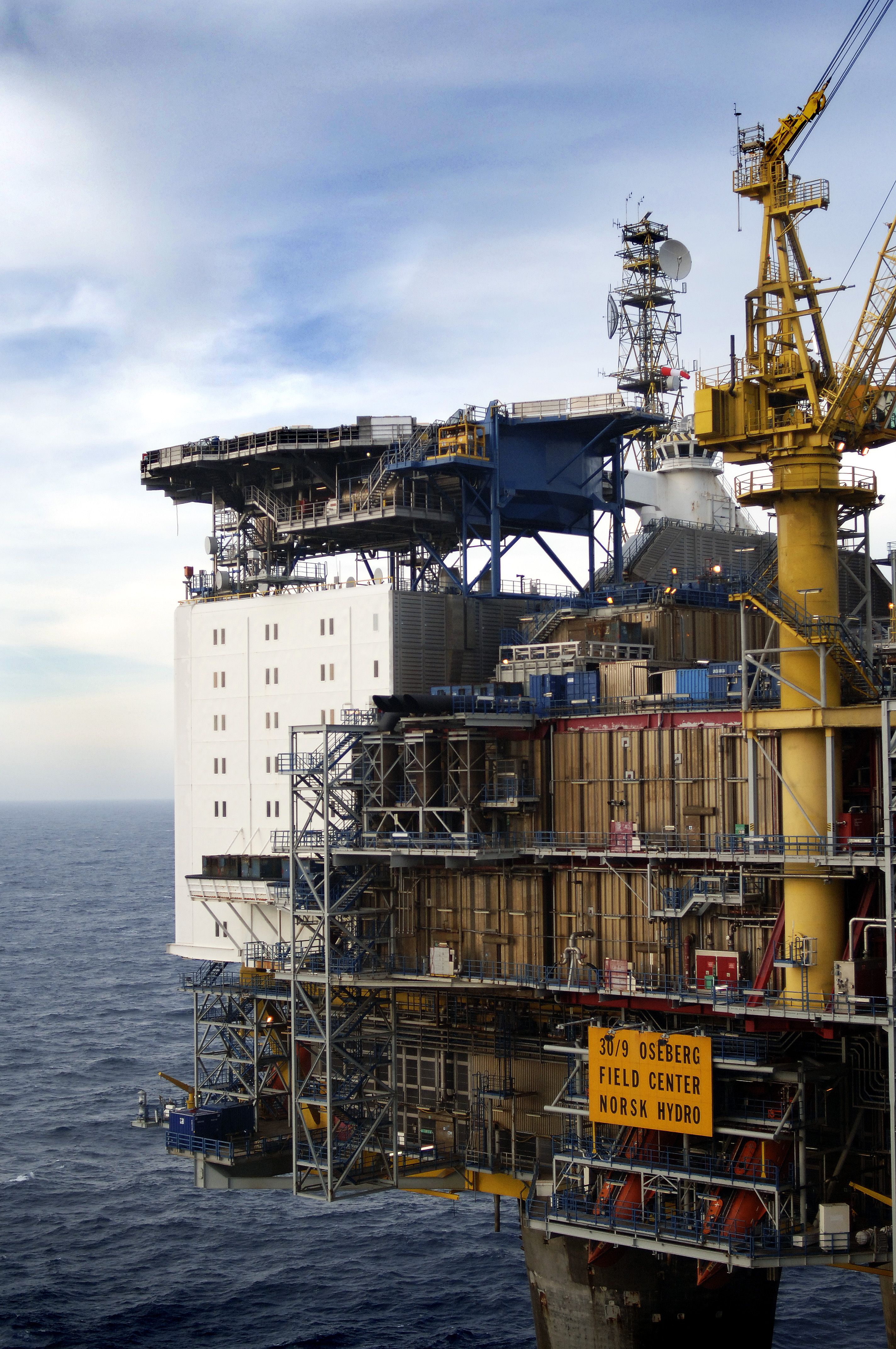 Oseberg feltsenter.